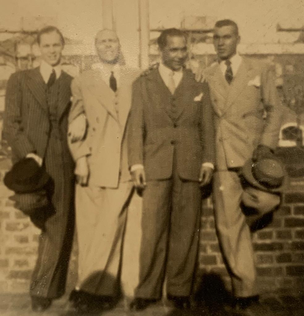 El segundo desde la derecha Ernesto N. De la Cruz y el primero de la derecha su hijo Lorenzo. 1943